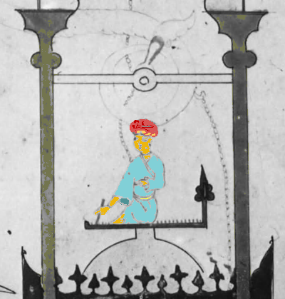 Détail (d'après une gravure ancienne) et colorisation du scribe effacé sur la copie d'époque du fichier commons Al-Jazari Bateau 0 .